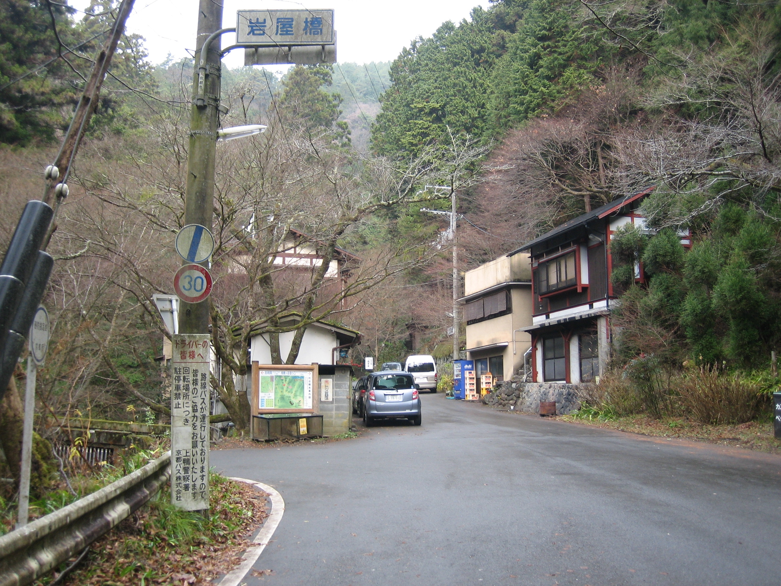 京都府道61号京都京北線を京都市北区雲ケ畑出谷町から撮影